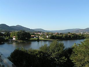 Arcozelo, Ponte de Lima